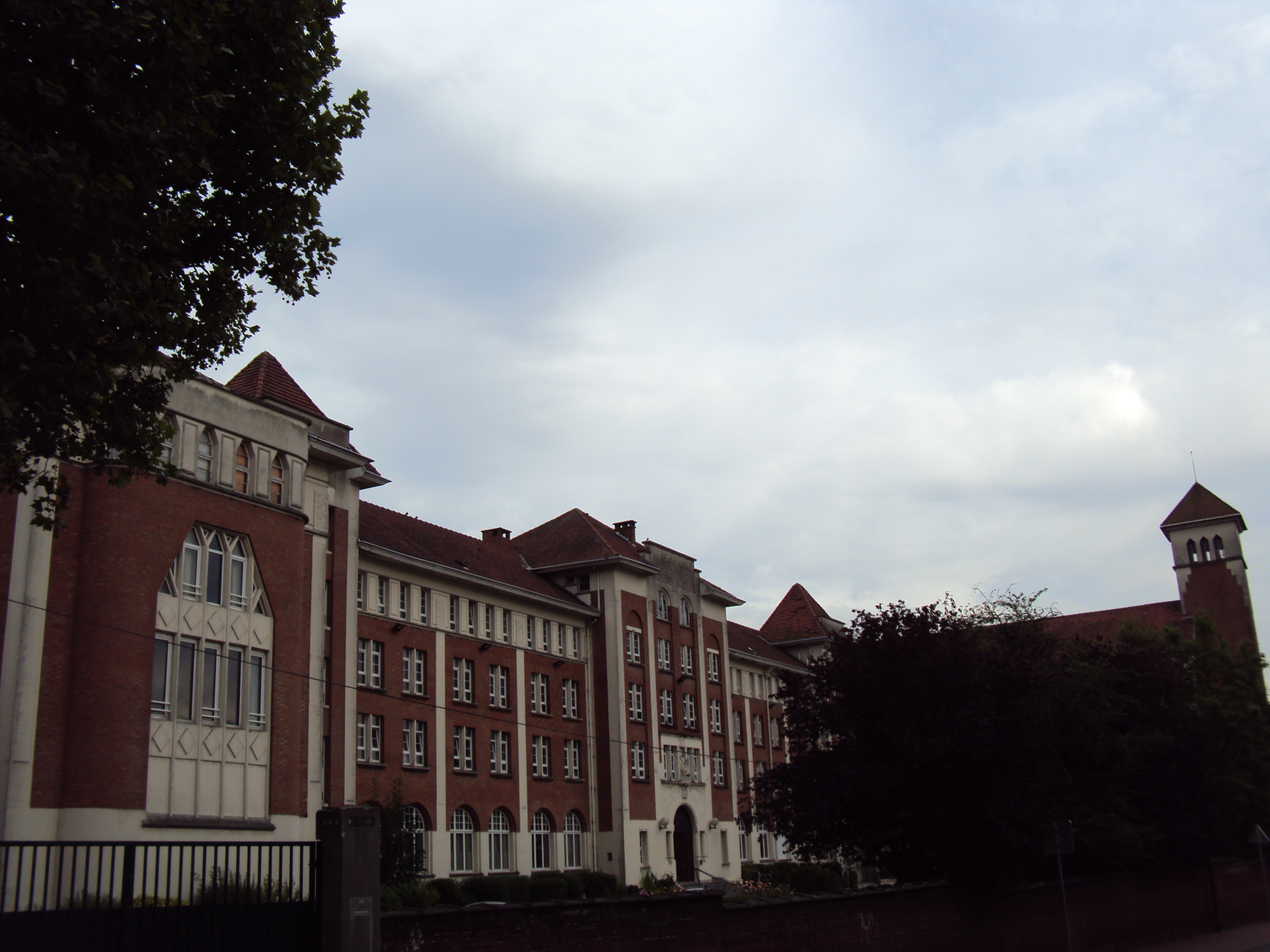 Grand séminaire de Lille (France) où sont formés des prêtres de l'Église catholique.